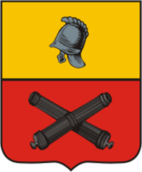 Wappen